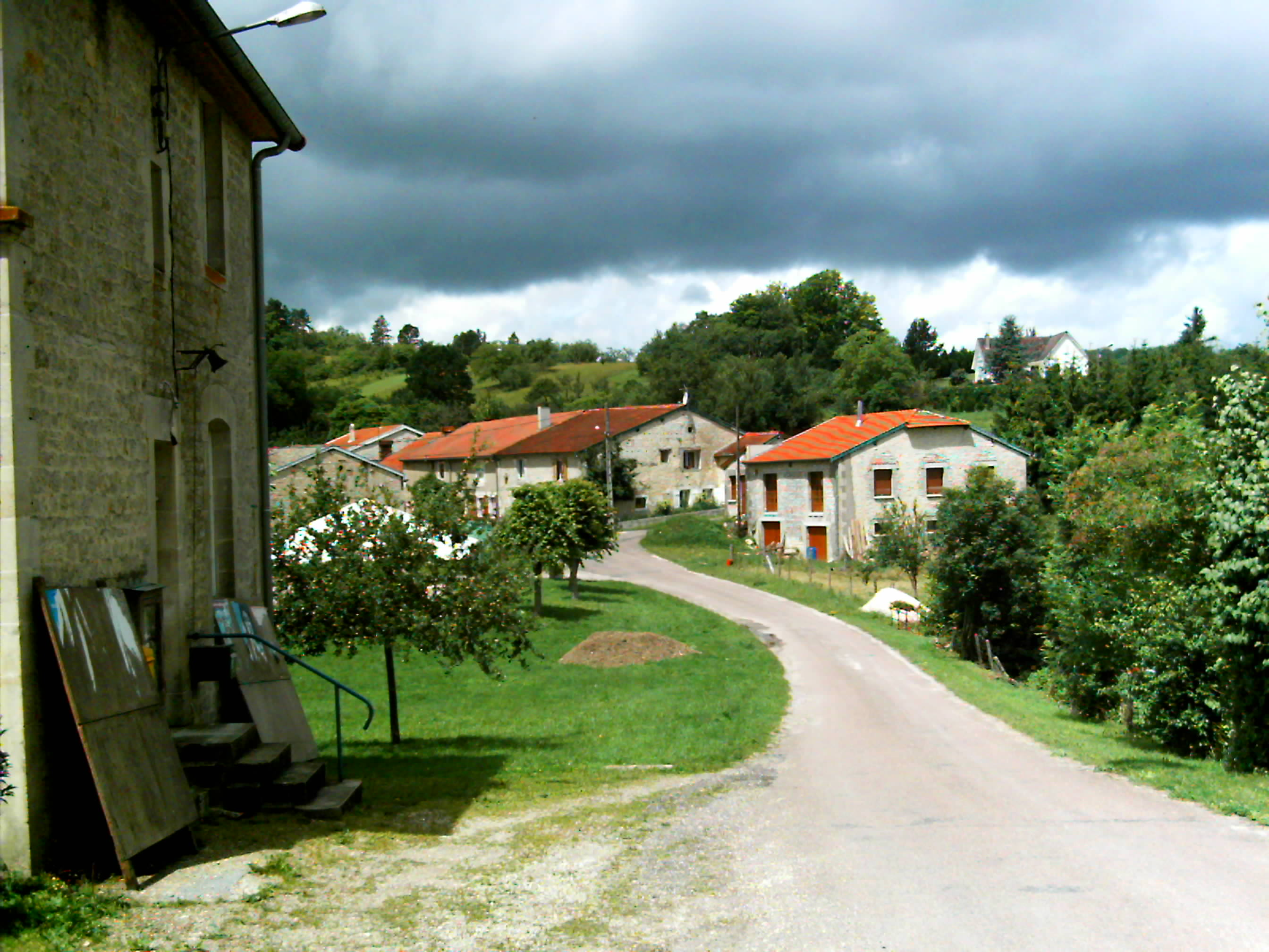 Village of Maconcourt (Haute Marne), France